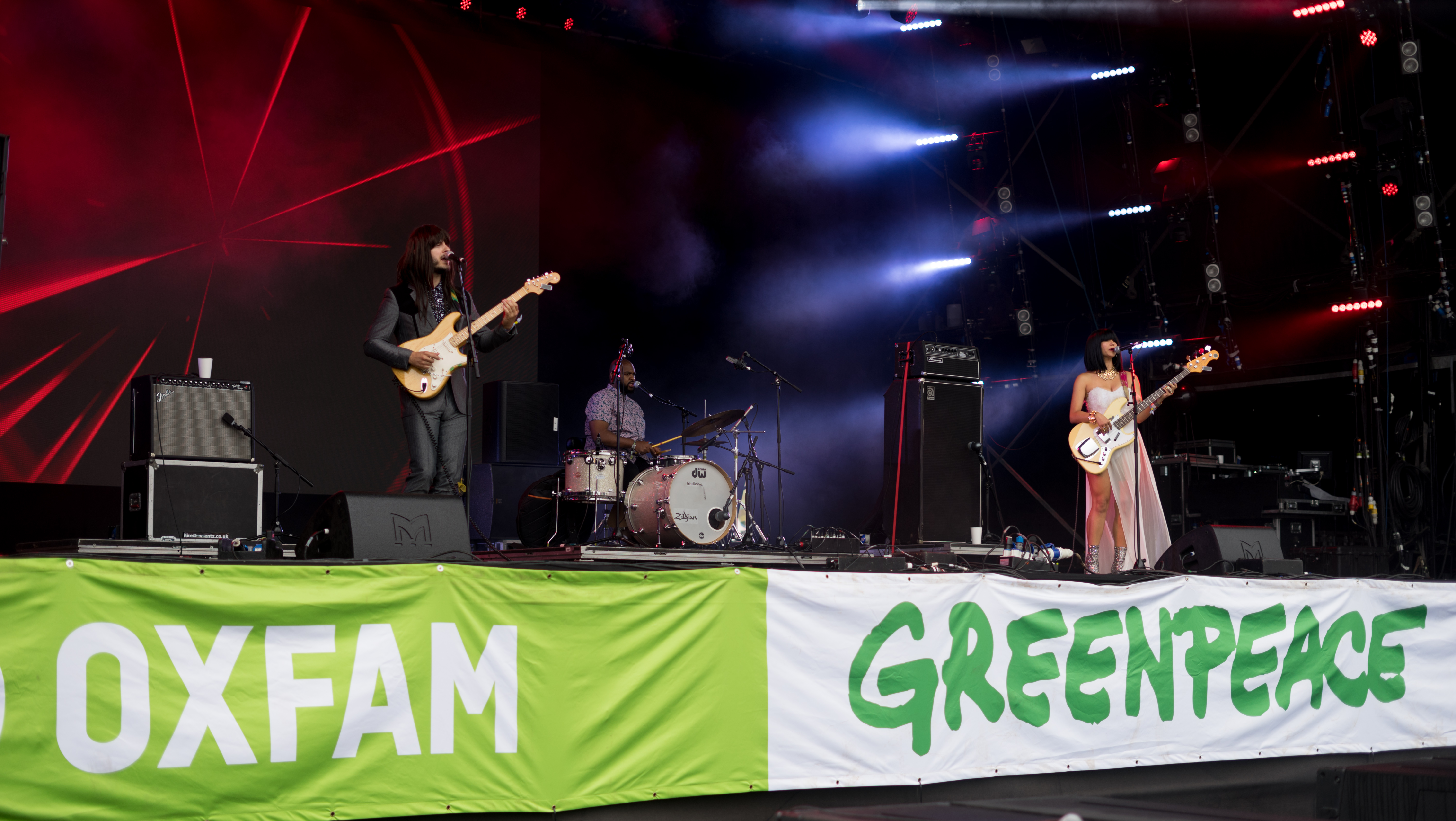 Glasto17-92